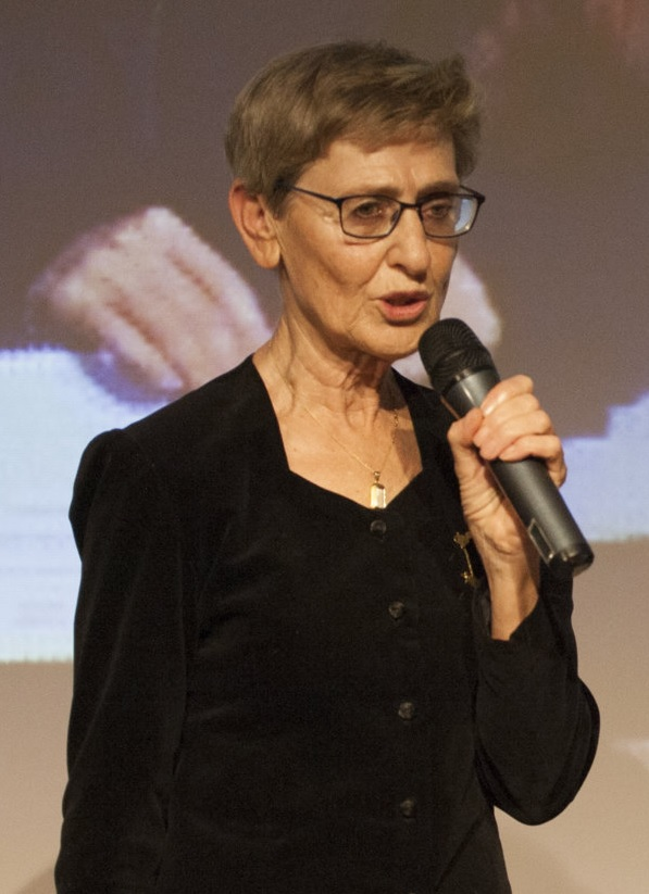 Marta Morazzoni, scrittrice italiana